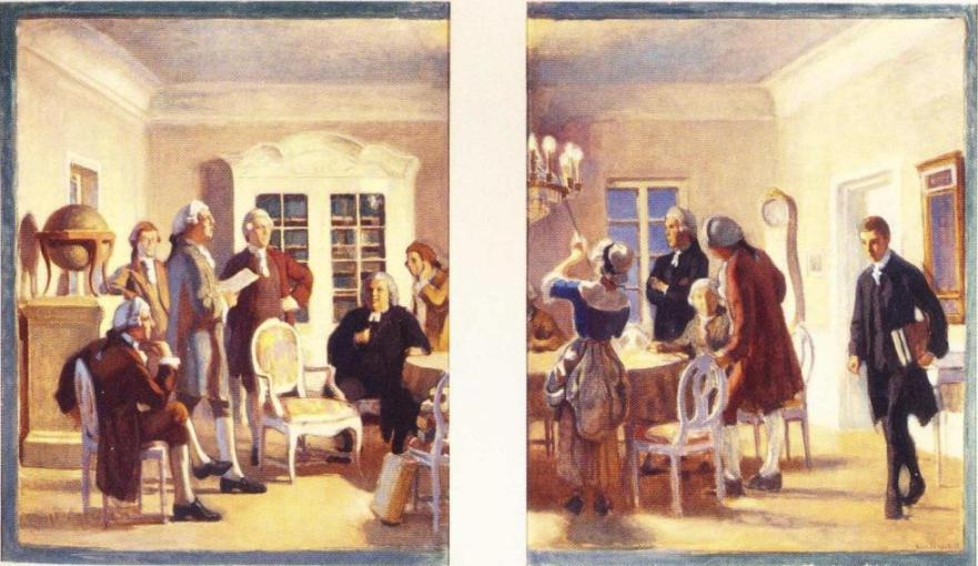 Eero Järnefeltin lopullinen luonnos Helsingin yliopiston päärakennuksen juhlasalin seinämaalaukseen Aurora-seura. Itse maalaus tuhoutui helmikuun 1944 ilmapommituksissa, mutta luonnos on säilynyt ja kuuluu Taidesäätiö Meritan kokoelmiin.